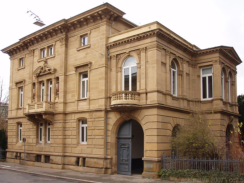 Villa in der Cäcilienstraße 51 in Heilbronn, heute Sitz des Grünflächenamtes der Stadt